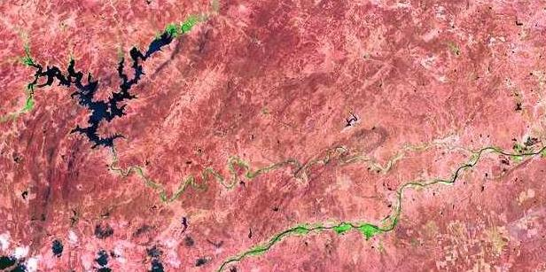 Açude Pedras Brancas e Foz do Rio Sitiá, Quixadá e Banabuiú, estado do Ceará, Brasil. Foto do satélite LANDSAT 7 tratadas pela EMBRAPA